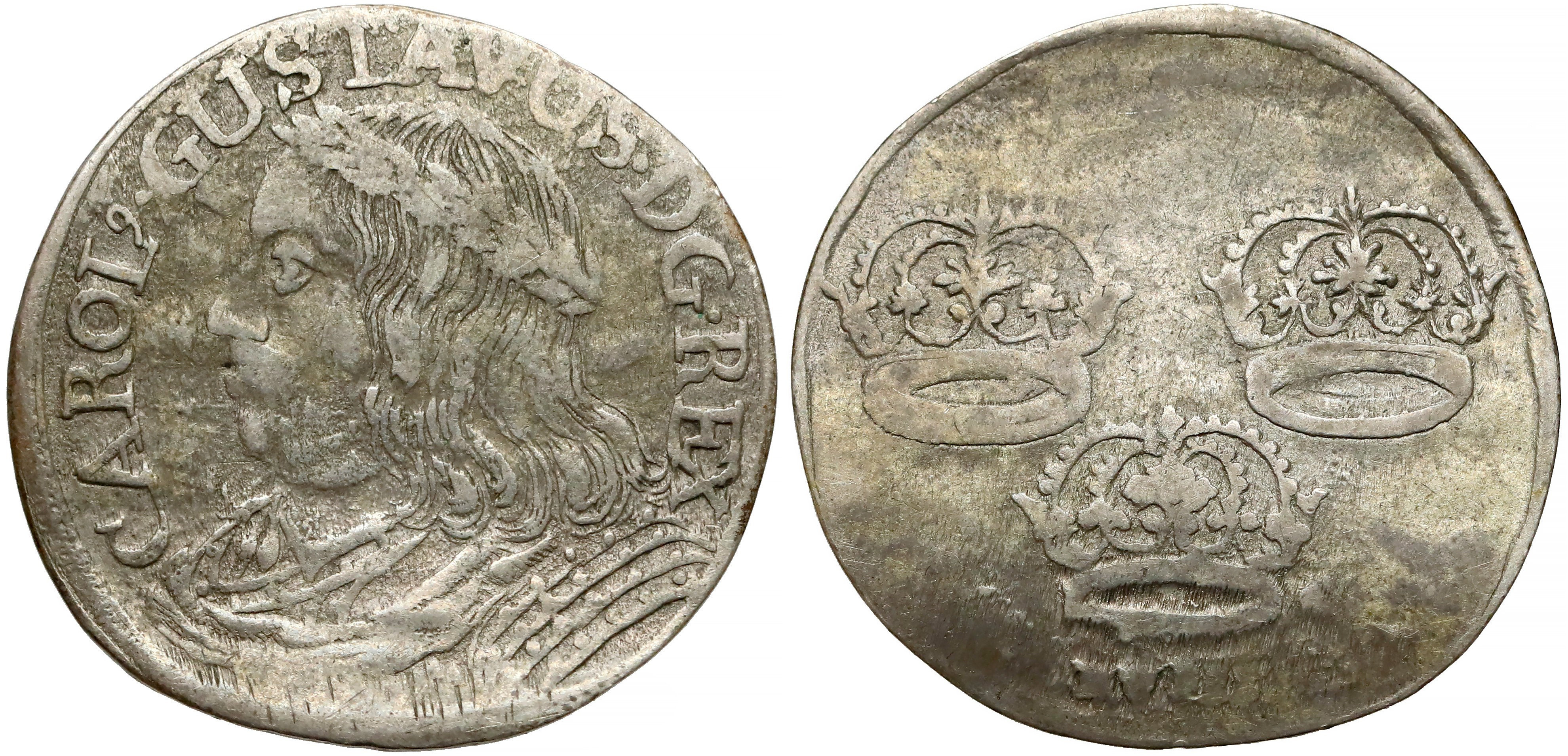 Ort bez daty Toruń Karol X Gustaw